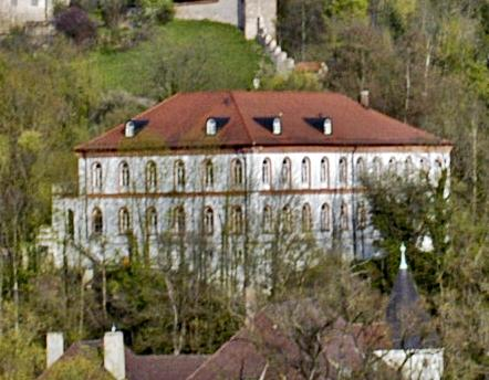 Ottonianum Landshut Westansicht (Ausschnitt von File:Panorama von Landshut 10410px.jpg)